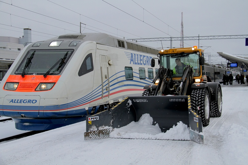 Uusi Lundberg 6210 töissä Kouvolan henkilöratapihalla.